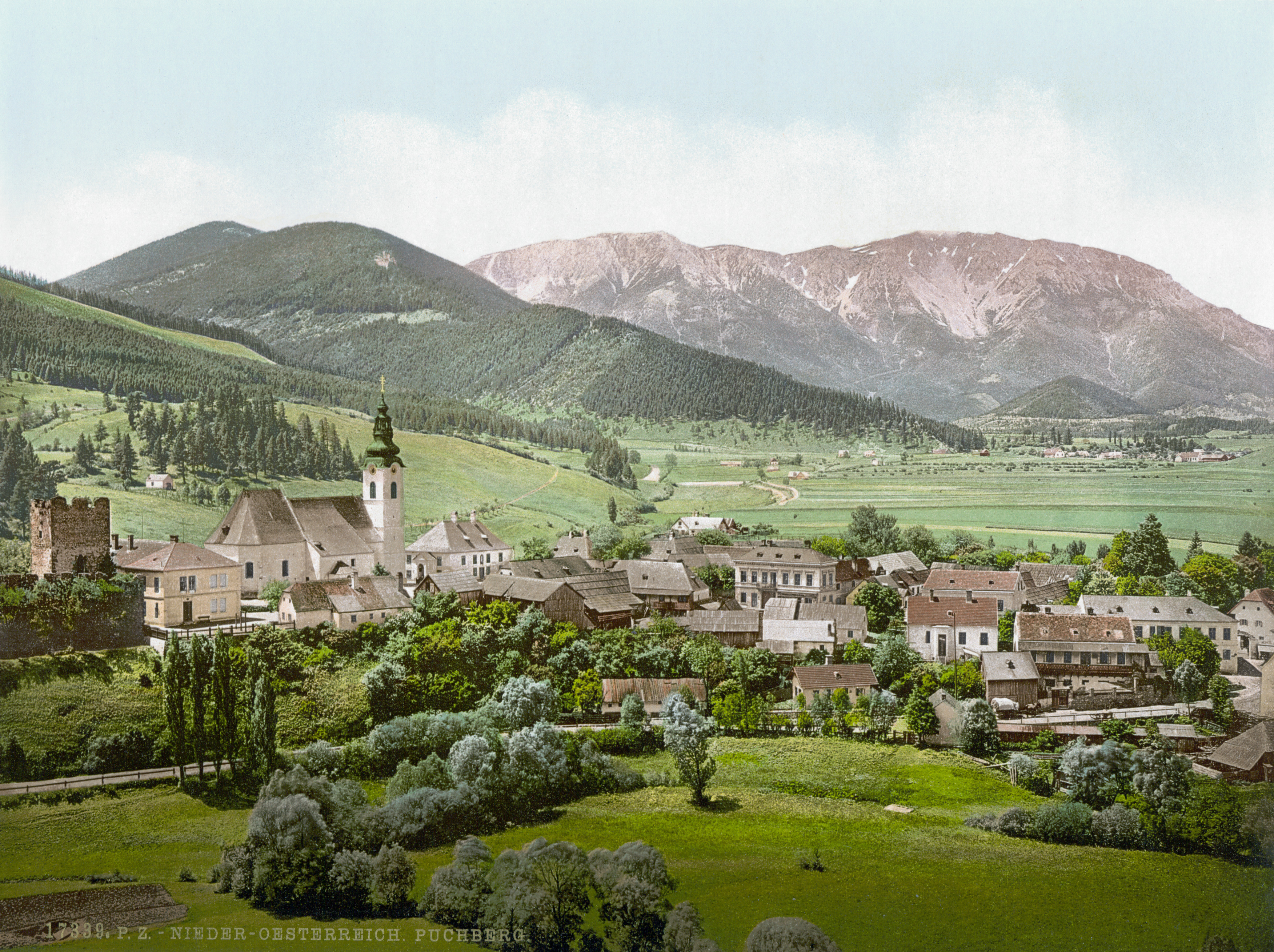 Puchberg am Schneeberg um 1900